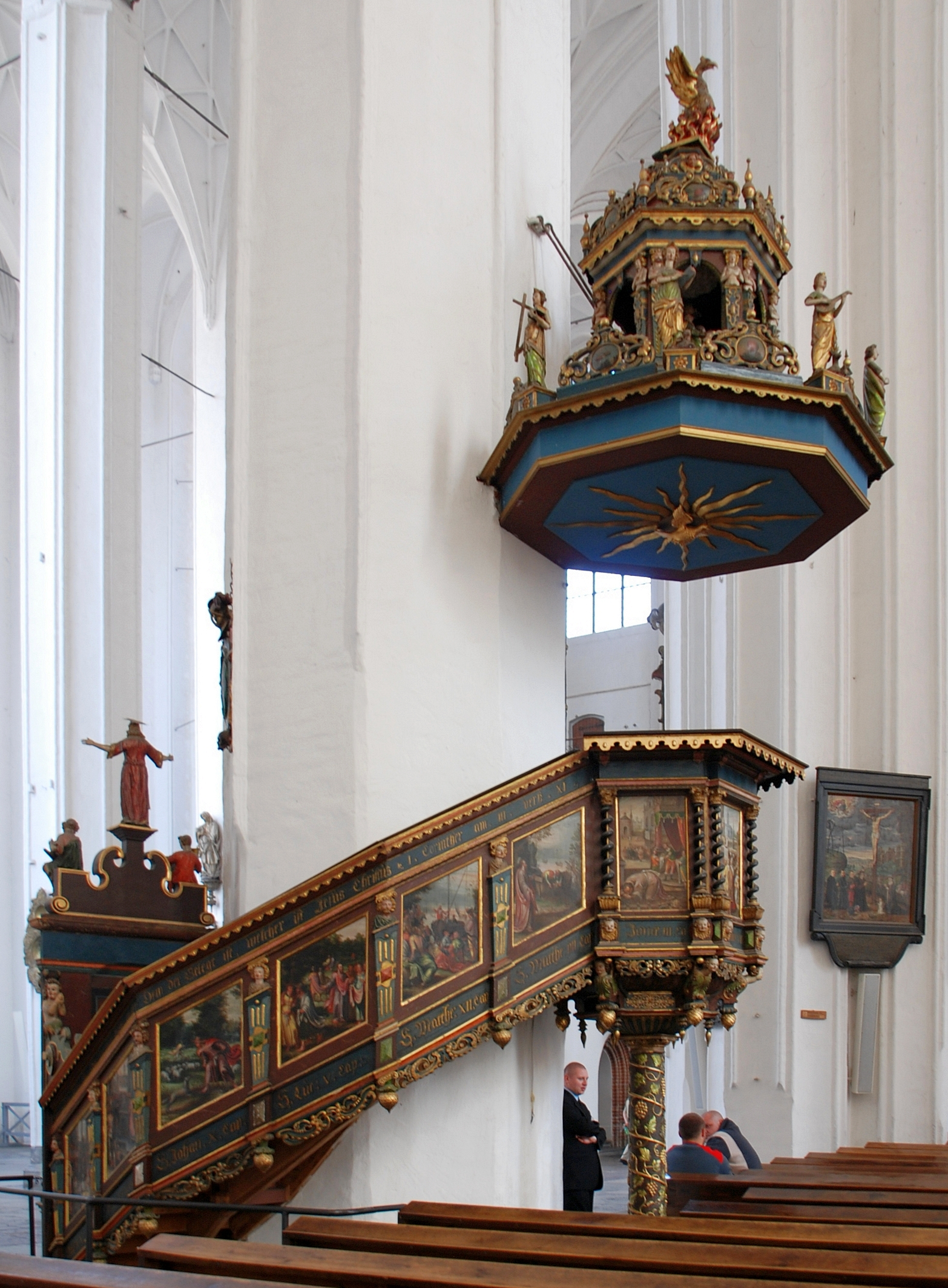 miasto Gdańsk